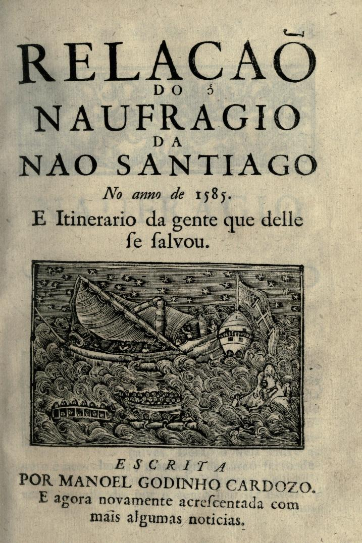 História Trágico-Marítima, Vol. II - Relação do naufrágio da nau Santiago, 1585